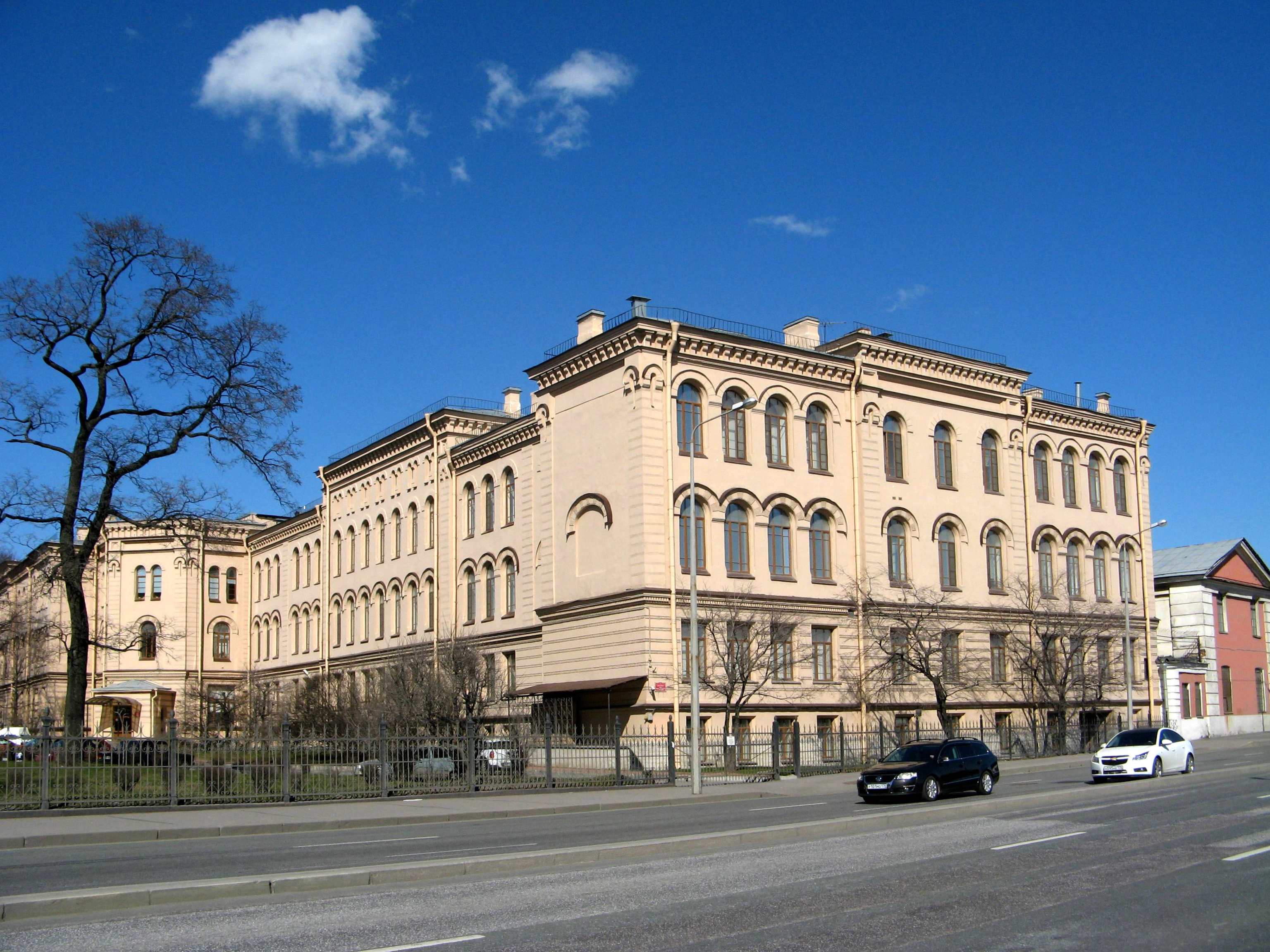 Здание школы: Арсенальная набережная, 3, улица Комсомола, 4, Калининский район, Санкт-Петербург